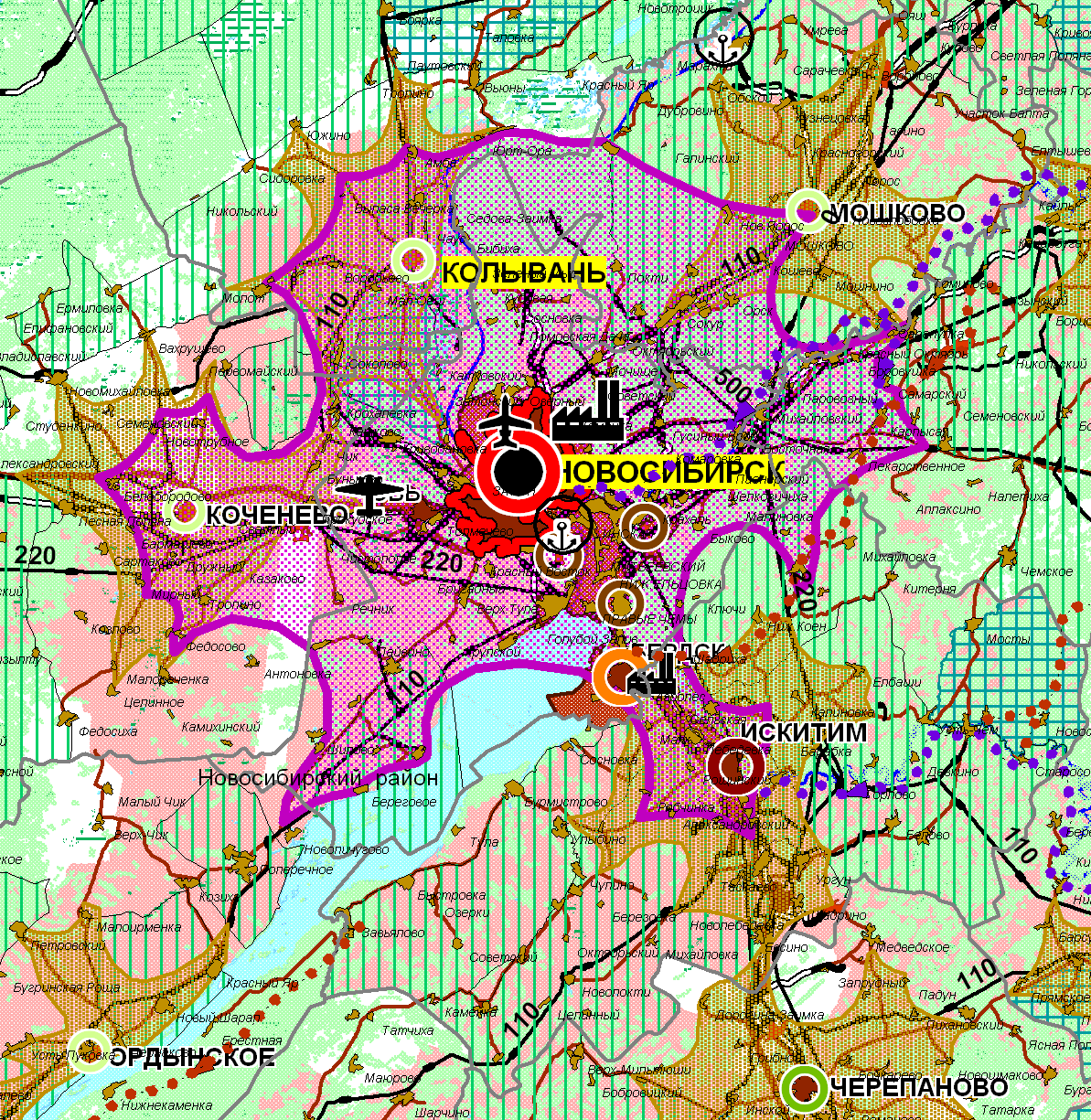 Схема территориального планирования Новосибирской области. Современное использование территории. Выделена в отдельный файл территория Новосибирской агломерации